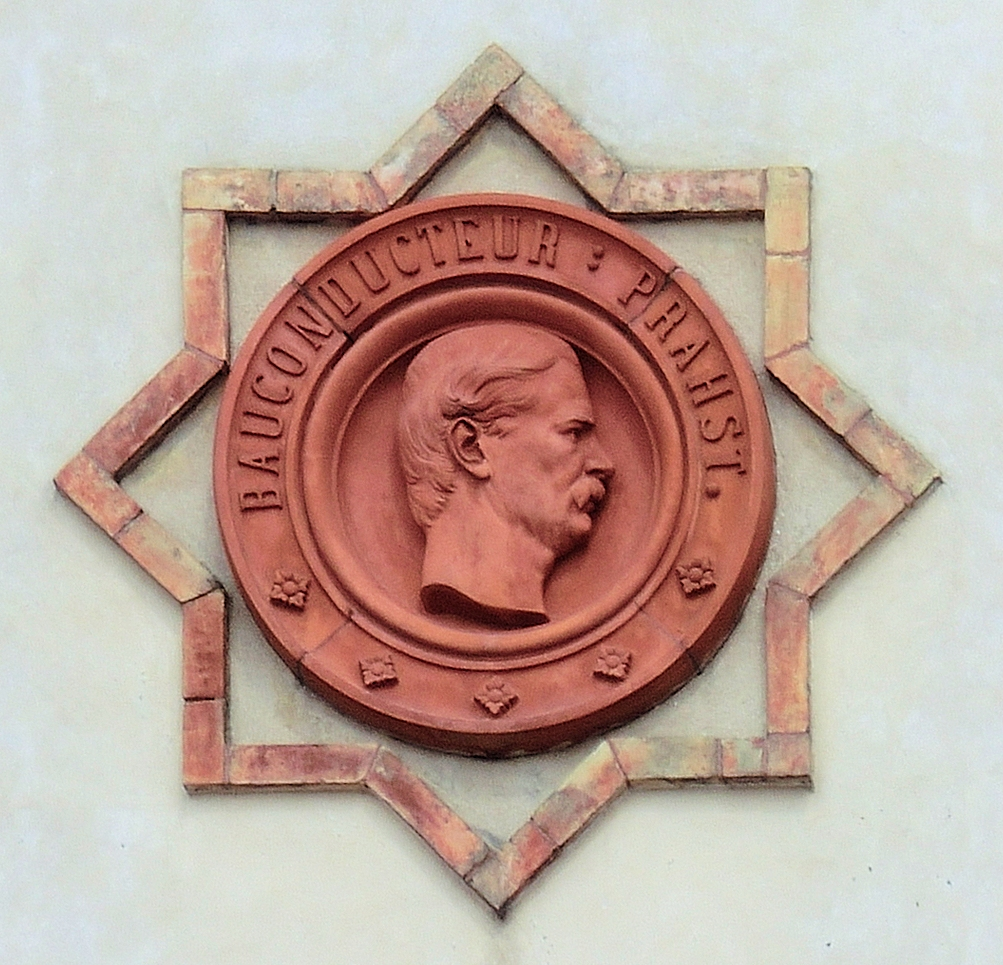 Rostock Universitätshauptgebäude Relief Bauconducteur Prahst